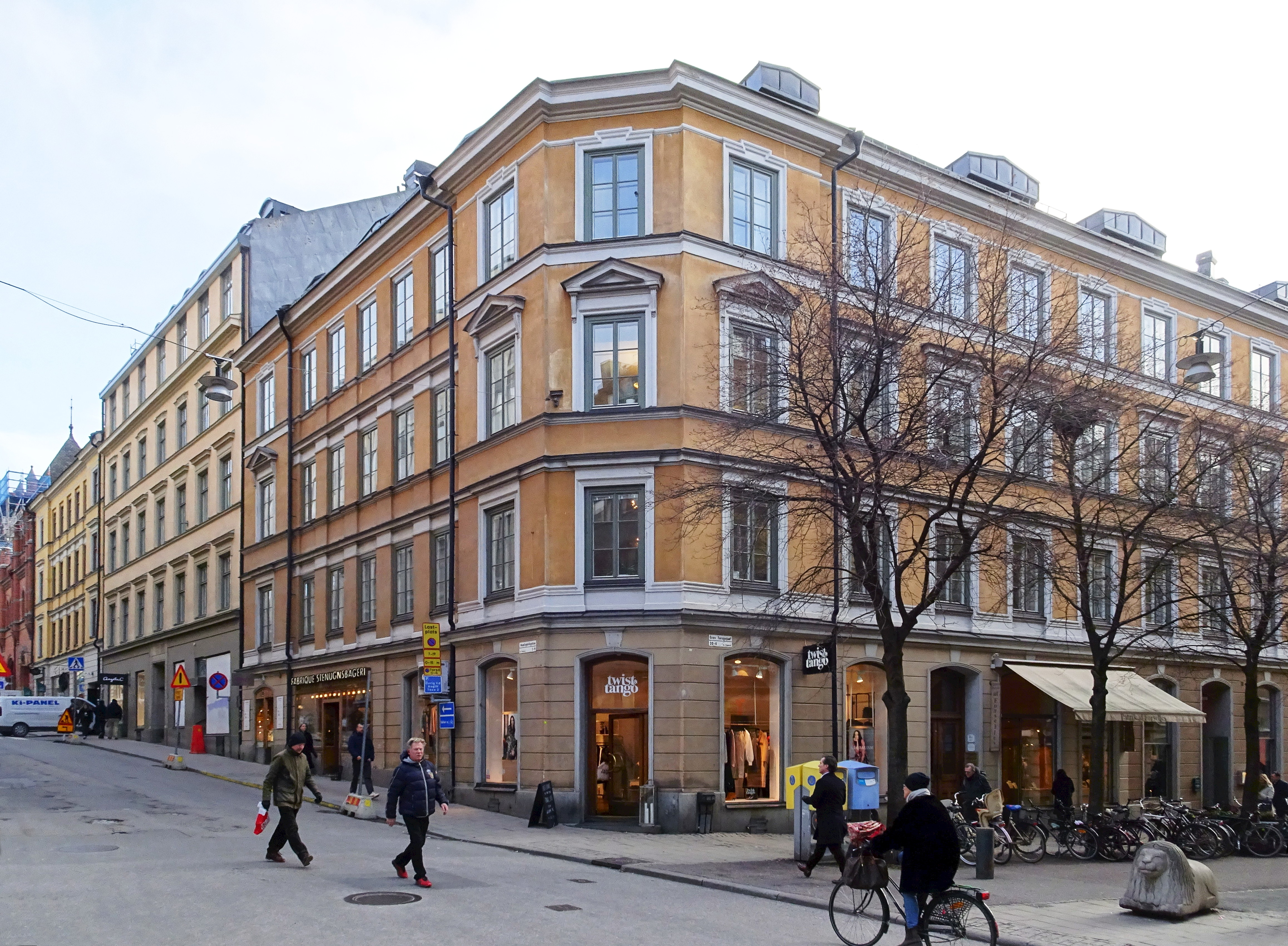 Grev Turegatan, Humlegårdsgatan, uppfört 1865 efter ritningar av arkitekt Emil Hawerman som även var byggherre. Grönmärkt av Stadsmuseet.